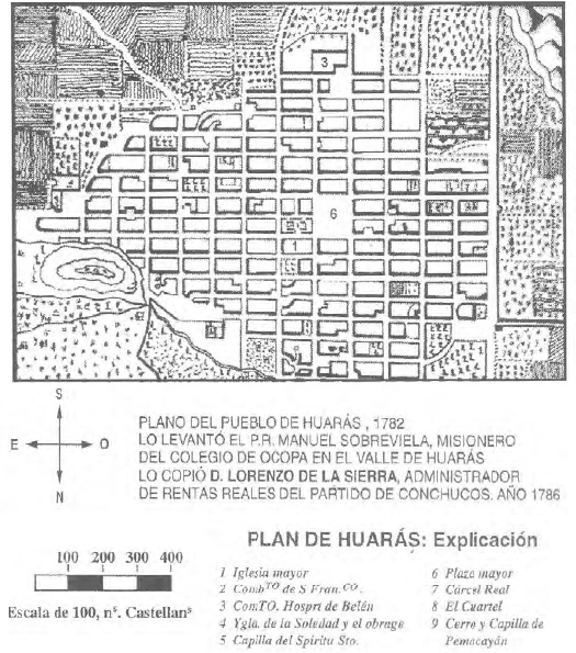 Plano de Huaraz levantado por fray Manuel Sobreviela en 1782